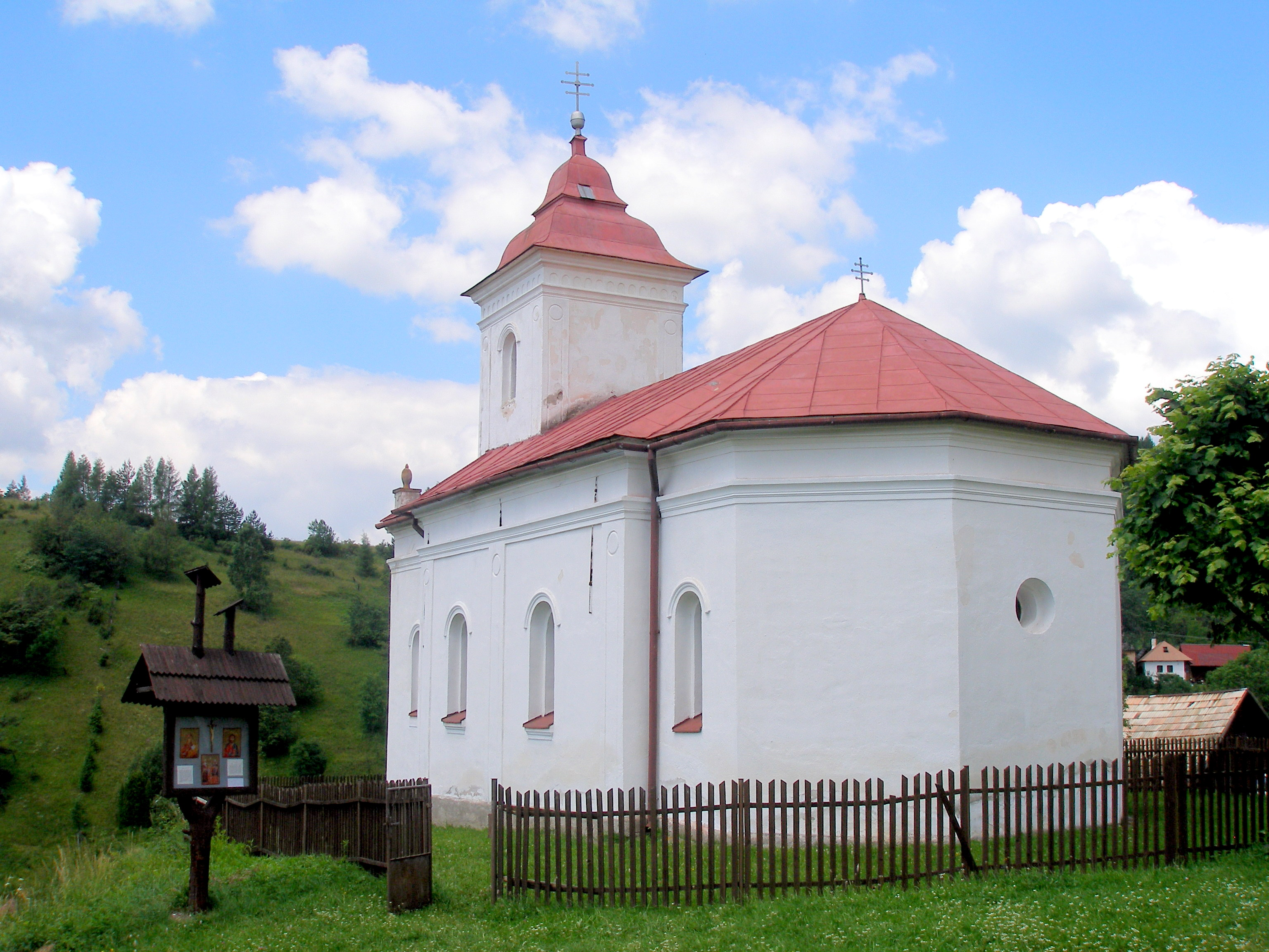 Osada Lačnov, miestna časť obce Lipovce. Okres Prešov. Prvá písomná zmienka o osade je z roku 1389. Až do roku 1991 bol Lačnov samostatnou obcou. Odvtedy bol po miestnom referende pričlenený k obci Lipovce. Časť chotára osady siaha do národnej prírodnej rezervácie Kamenná baba. Známy je aj Lačnovský kaňon (745 m nad morom). V chotári osady ležia horské vrcholy Buče (1006 m nad morom), Magura (1064 m nad morom) a Bachureň (1081 m nad morom). V roku 1996 bol Lačnov zapísaný do zoznamu pamiatkových zón Slovenskej republiky s 5 národnými kultúrnymi pamiatkami. Jednou z nich je aj miestny kostol. Národná kultúrna pamiatka, Chrám svätého Michala archanjela bol vysvätený v roku 1907. Kostol